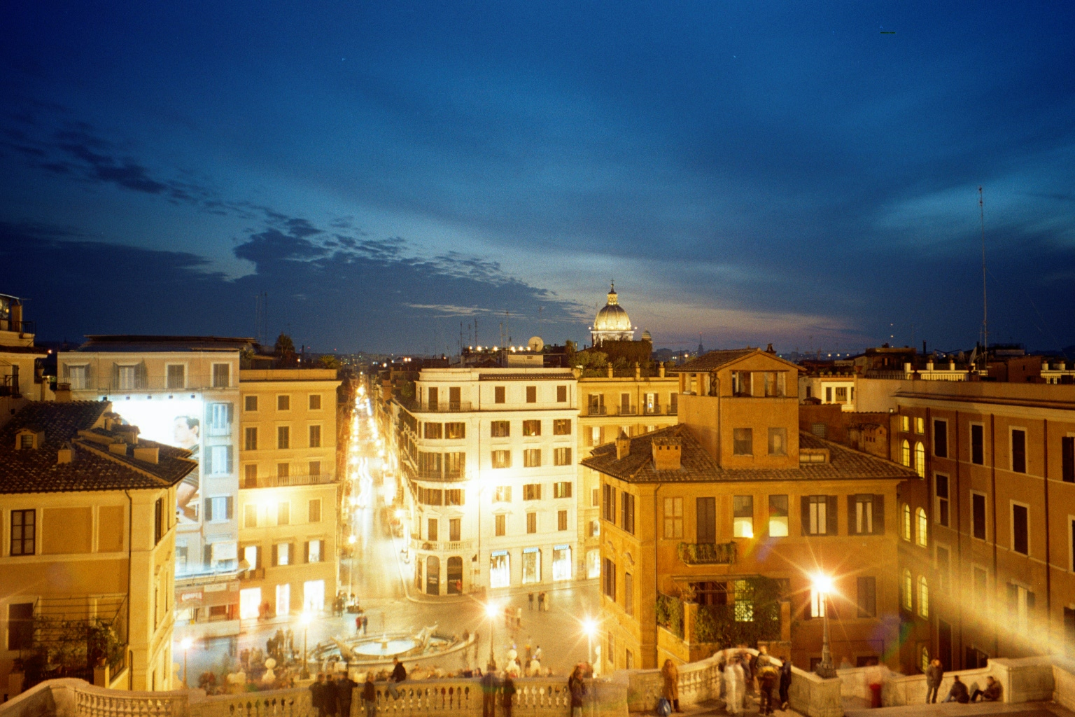 Piazza di Spagna, Roma, Italy.